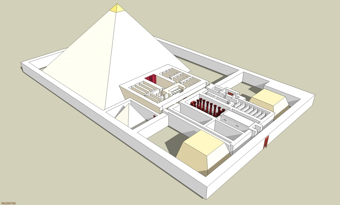 Essai d'élévation du temple haut et de la pyramide de Djedkarê Isési